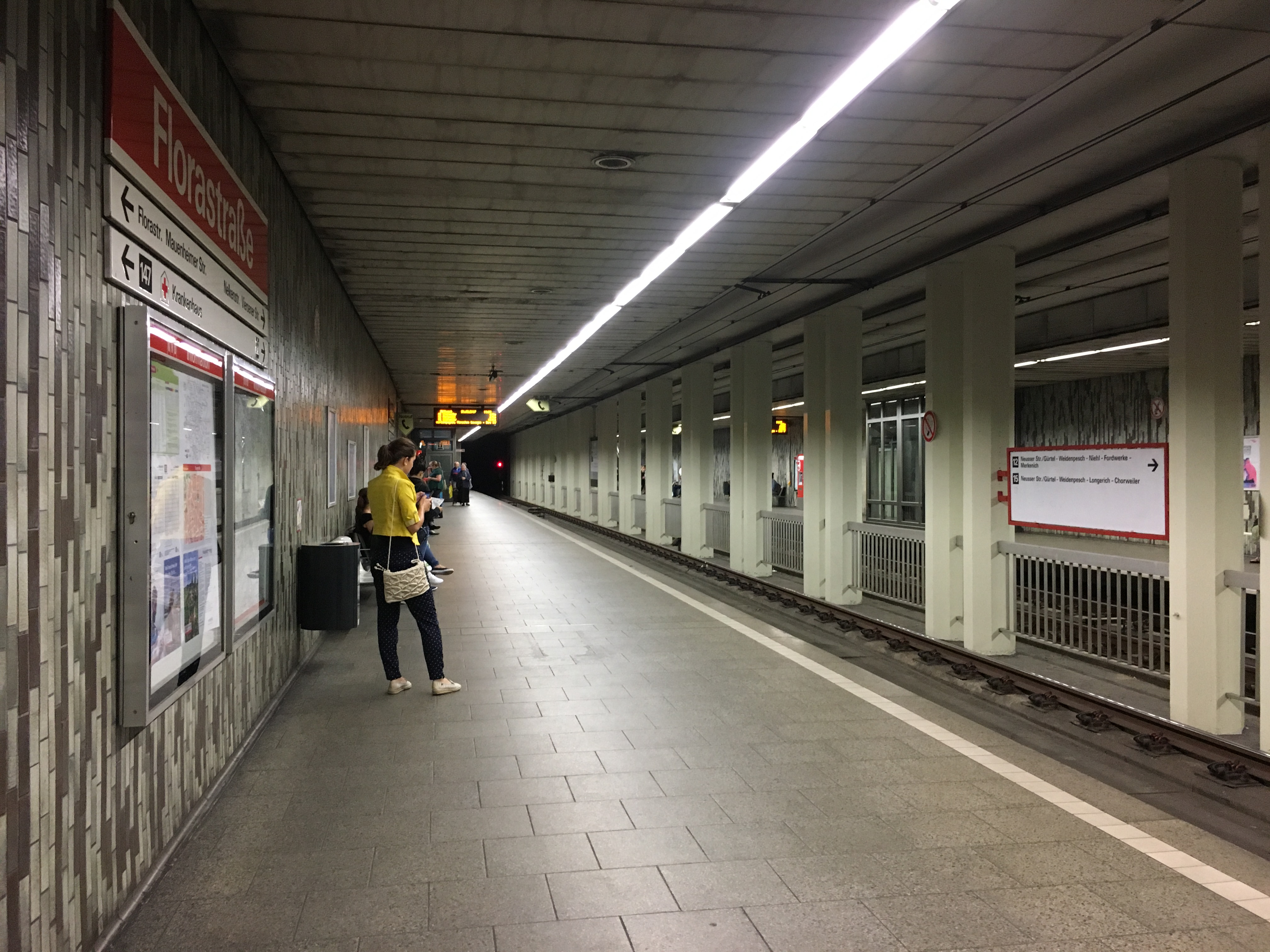 U-Bahnhof Florastraße (Köln)